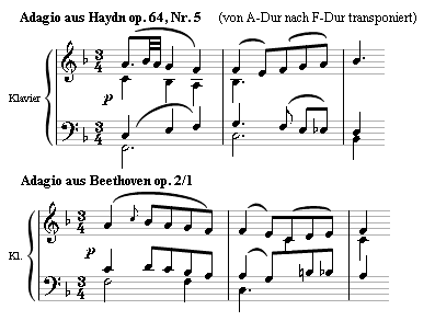 Vergleich von Beethovens op. 2/1 mit Joseph Haydns Hob. 67